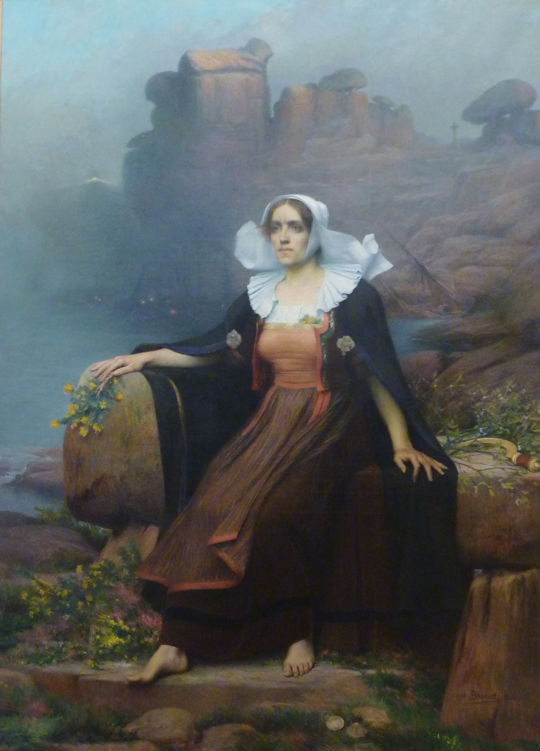 tableau illustrant la vogue du thème breton à la fin du XIXe et au début du XXe siècle